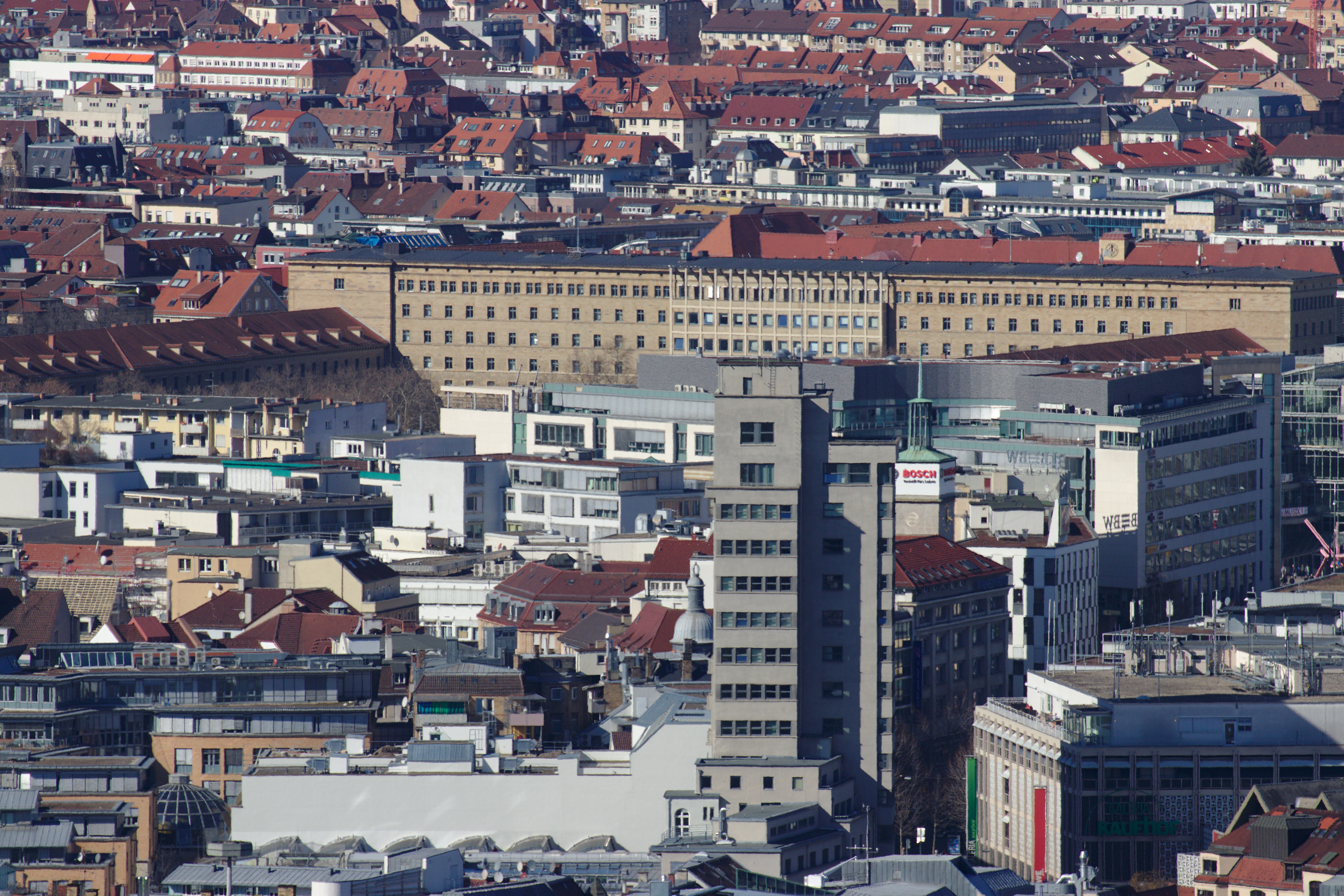 Rotebühlbau (ehemalige Kaserne) in Stuttgart. Erbaut 1827 und 1843 Johann Kaspar Vogel (Baurat) und Ludwig Friedrich Gaab (Hofbaumeister) im klassizistischen Stil. Geschützt nach § 2 DSchG. Im Vordergrund der Tagblatt-Turm.